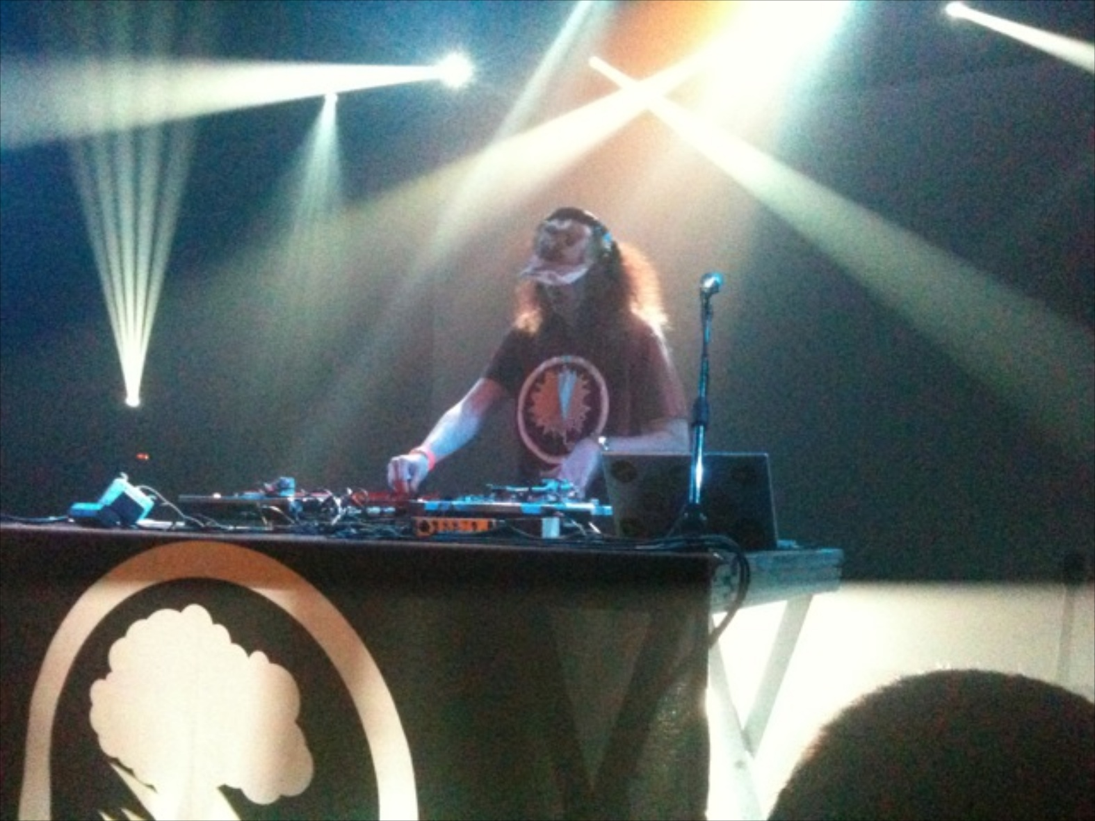 At Botanique in Brussels, Belgium, november 2010